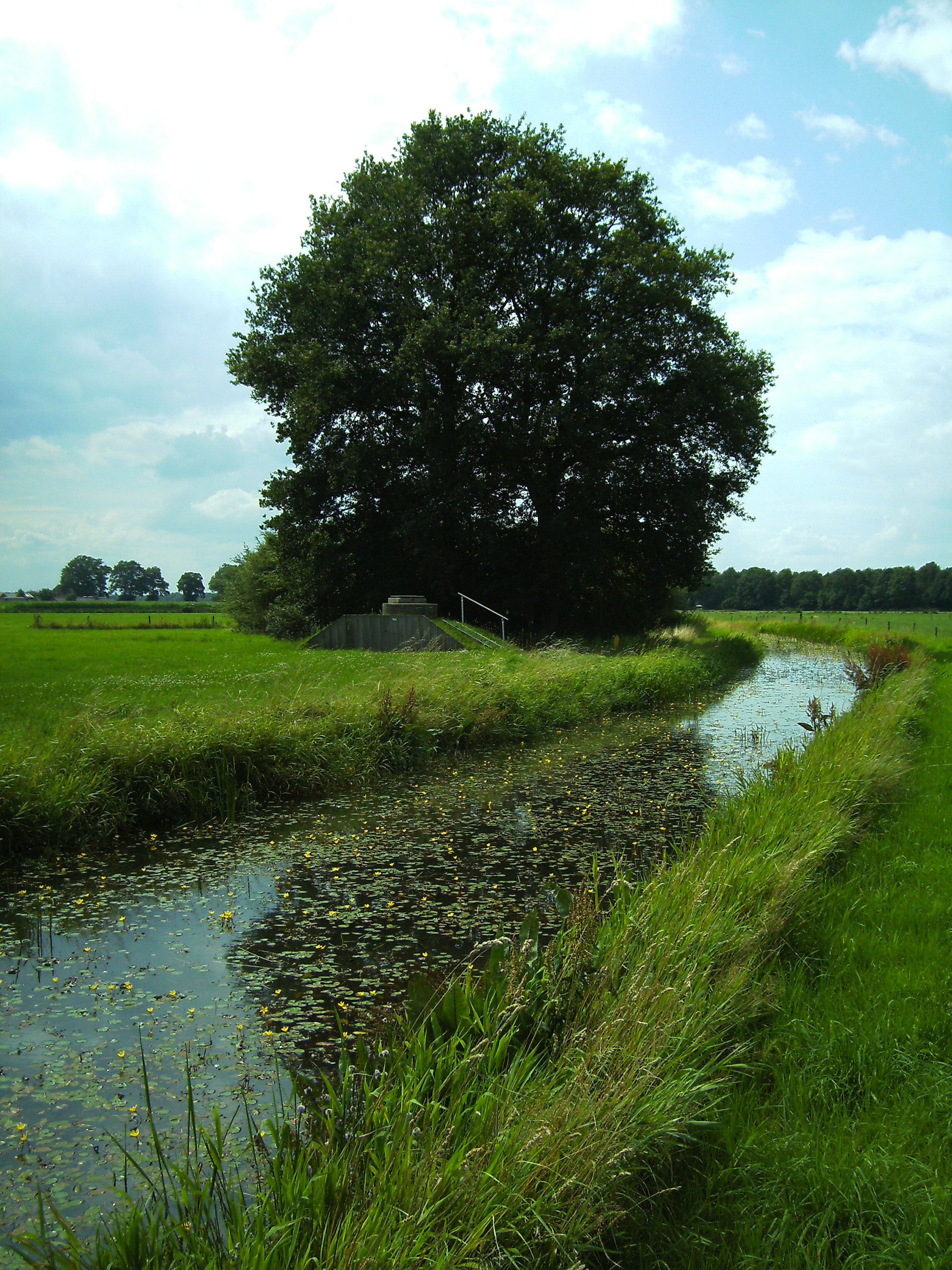 Waterwinput voor oevergrondwater. Het water wordt bij Deventer uit de IJssel gepompt en gaat via het Overijsselskanaal naar de Soestwetering bij Okkenbroek waar de putten langs de oever liggen.